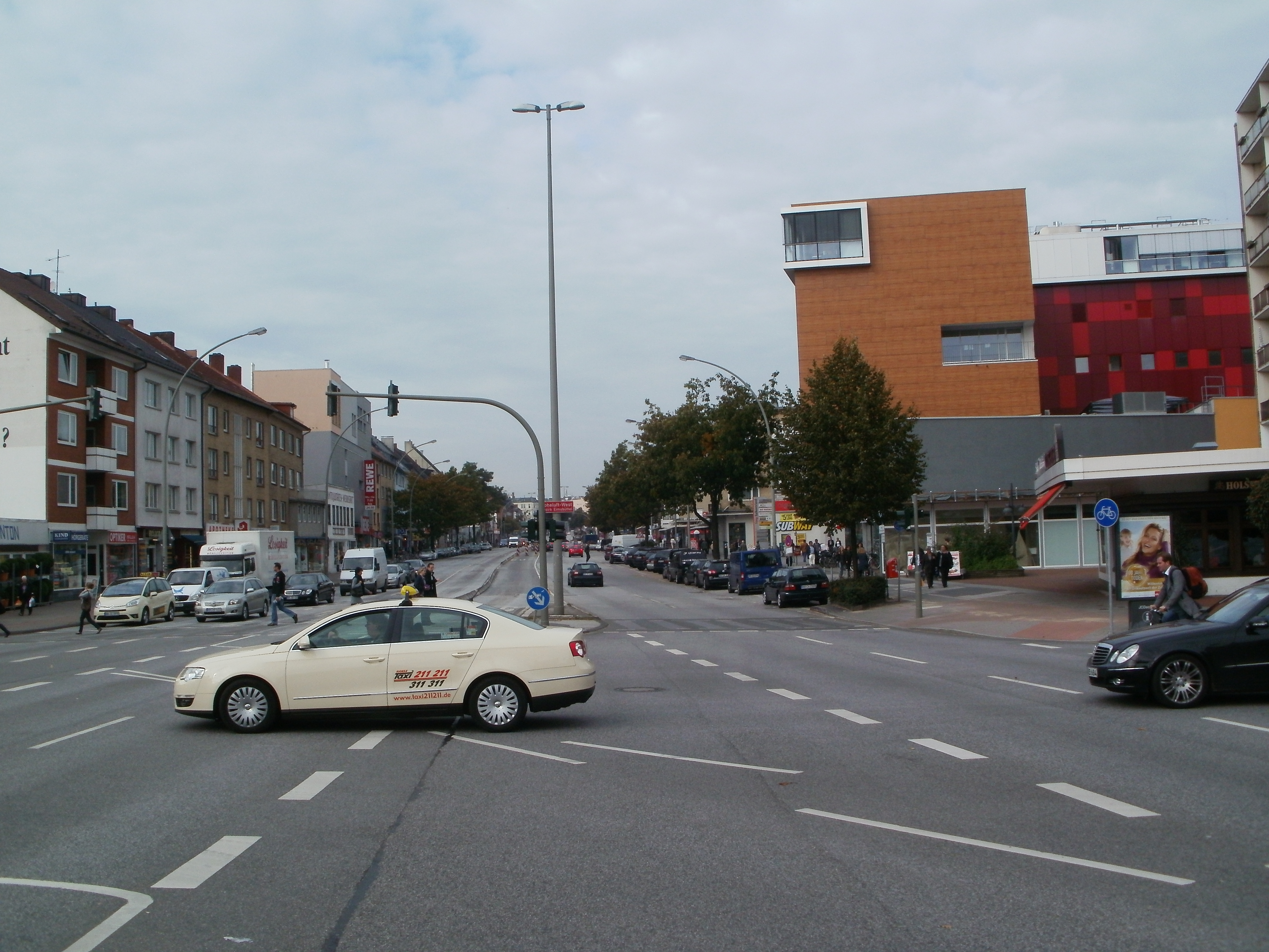 Blick entlang der Hoheluftchaussee Hamburg-Hoheluft.